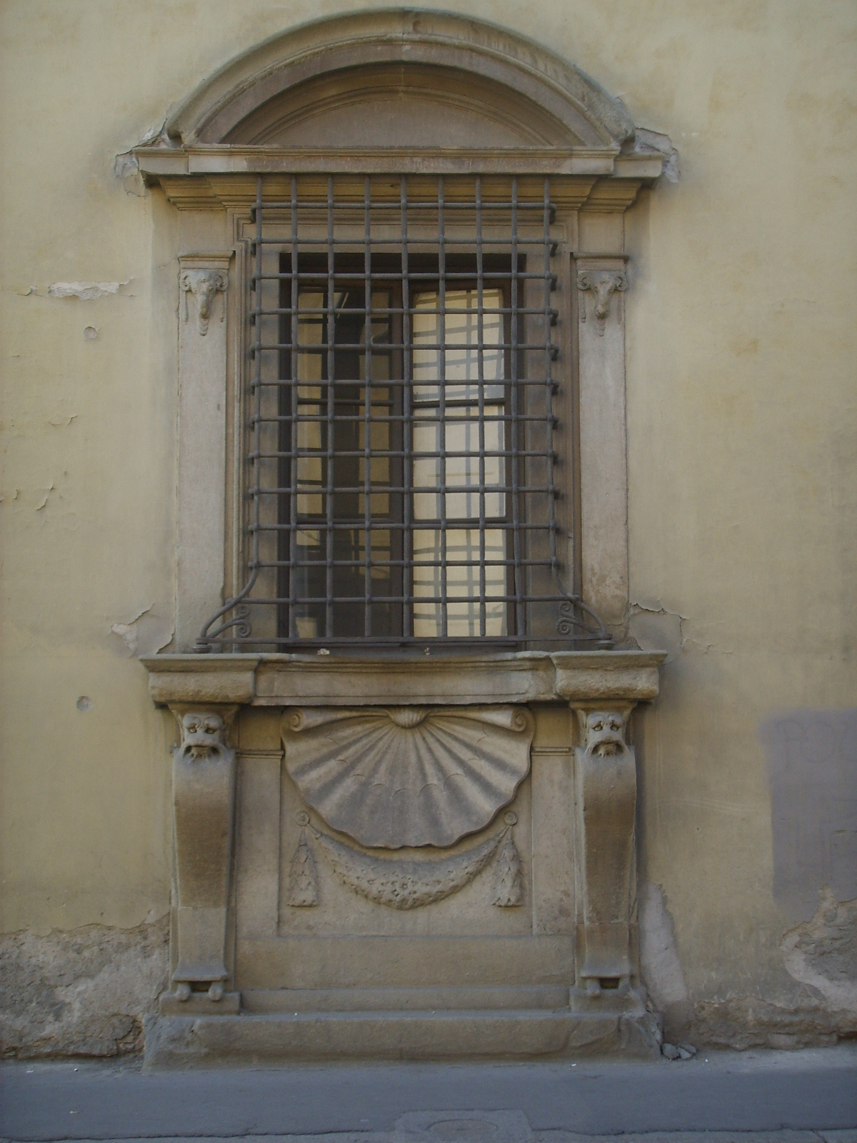 Casino_di_San_Marco,_finestra